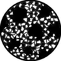 Gefügeschliffbild einer eutektikumsnahen Legierung mit „Primär-B“-Kristallen